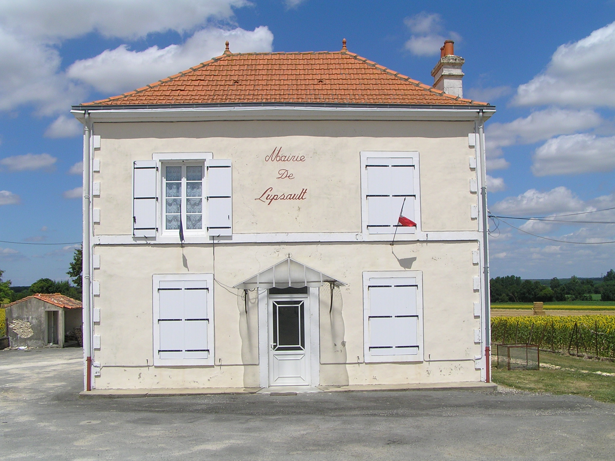 mairie de Lupsault